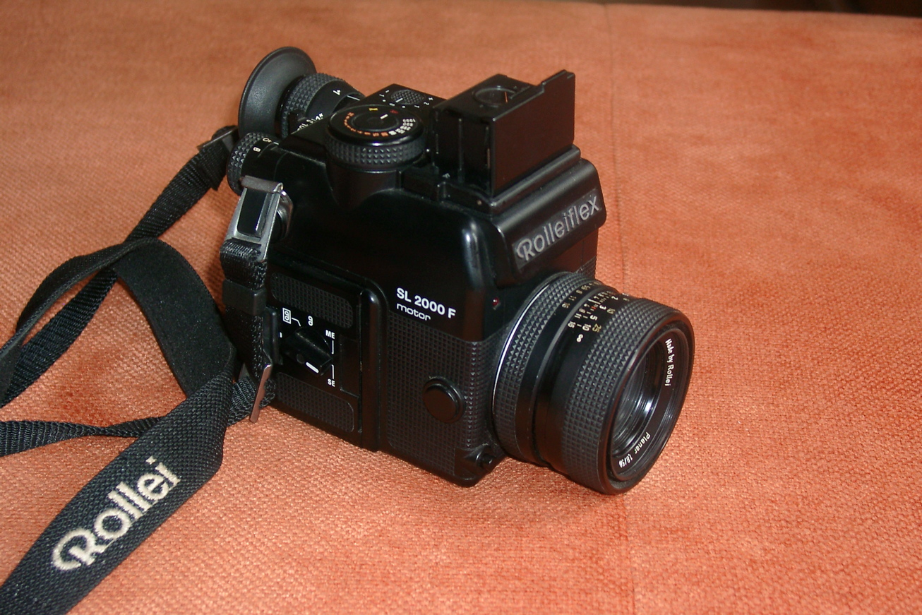 Schrägansicht einer Rollei SL 2000 F